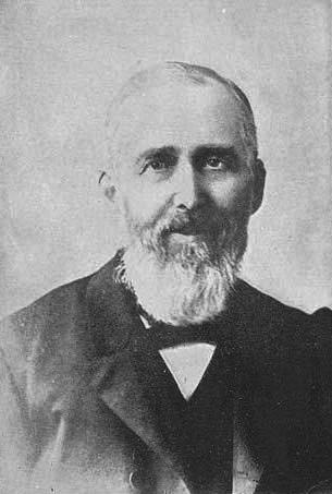 Adélard Joseph Boucher (1835-1912)